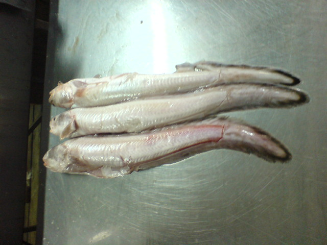 Conger conger, fotografía tomada en Puerto Montt